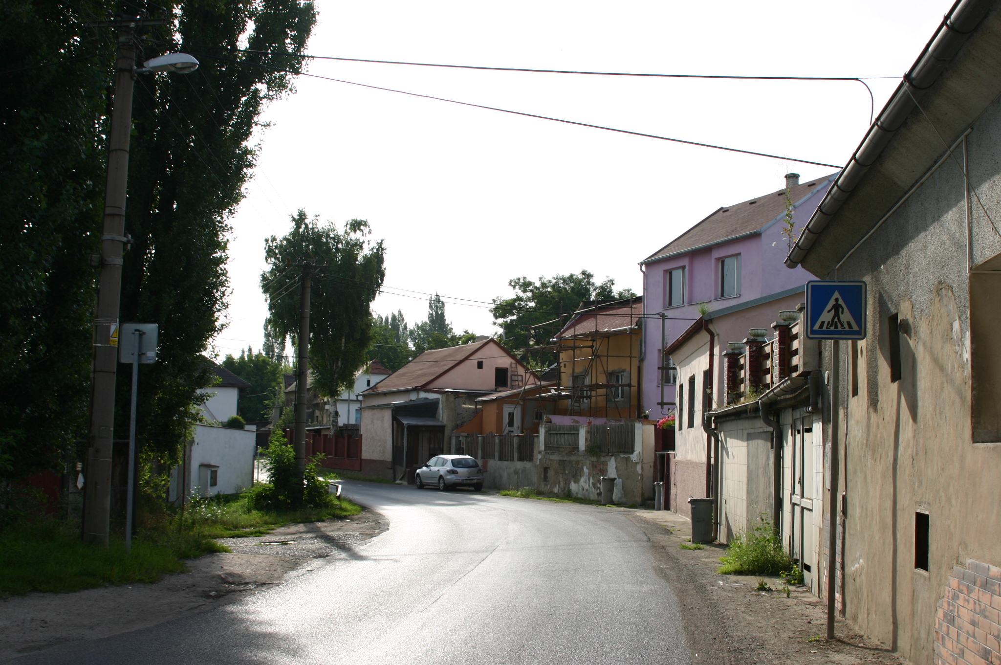 Osada Chanov v okrese Most, Chanovská ulice